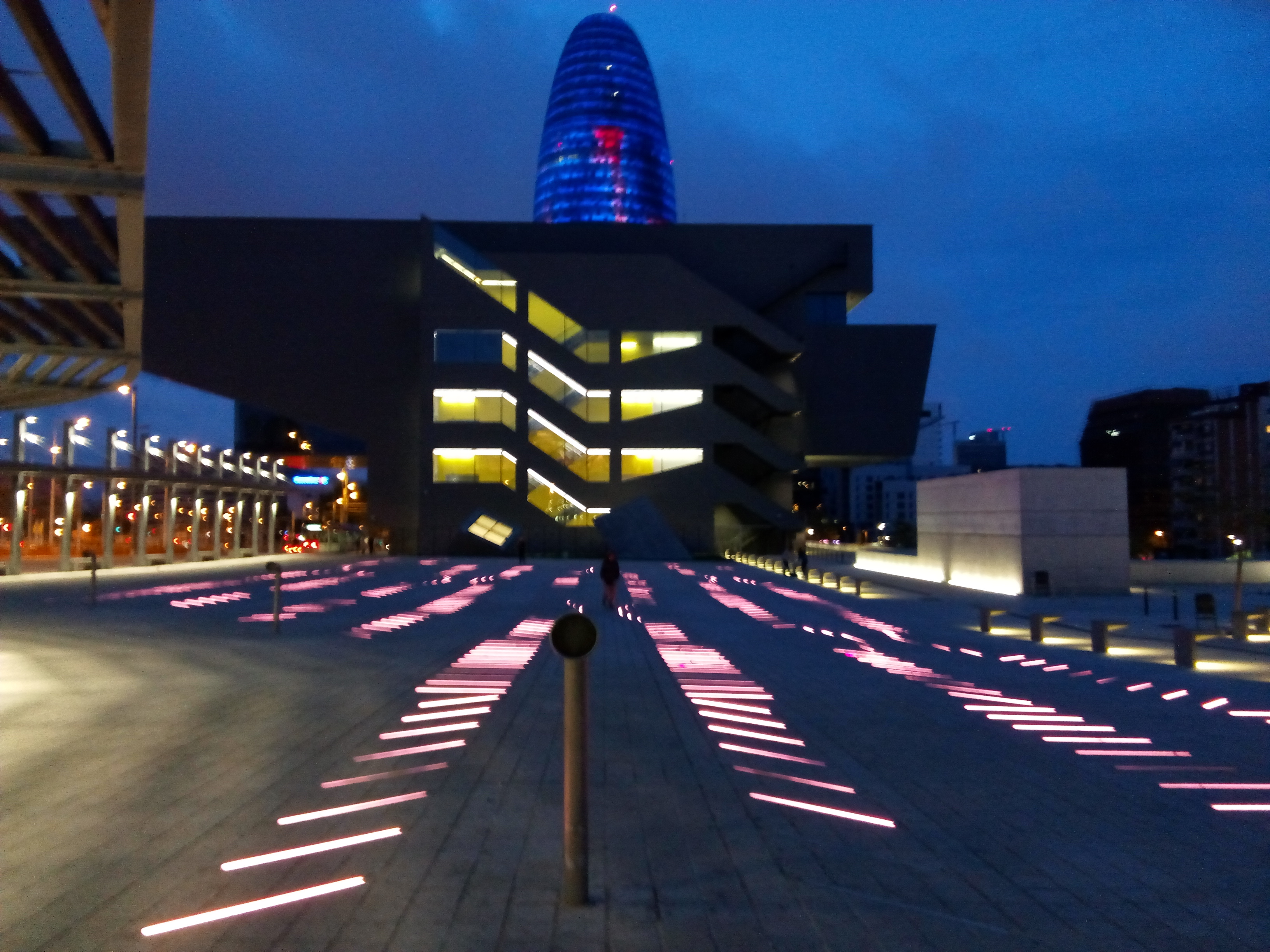 Fotografía frontal de la intalación BruumRuum!